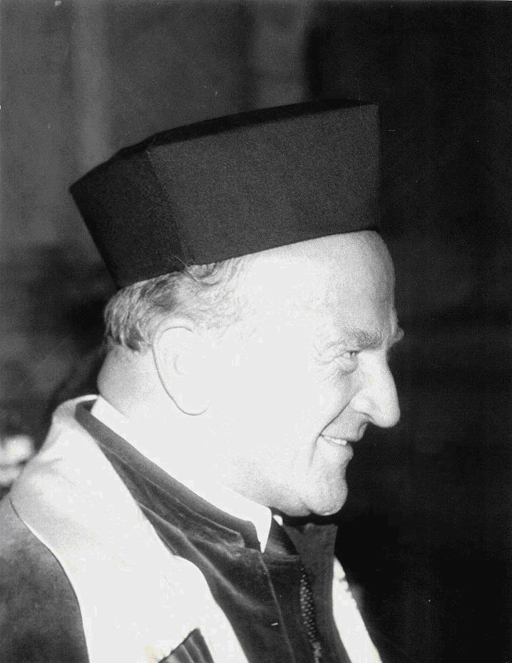 Jerzy Litwiniszyn